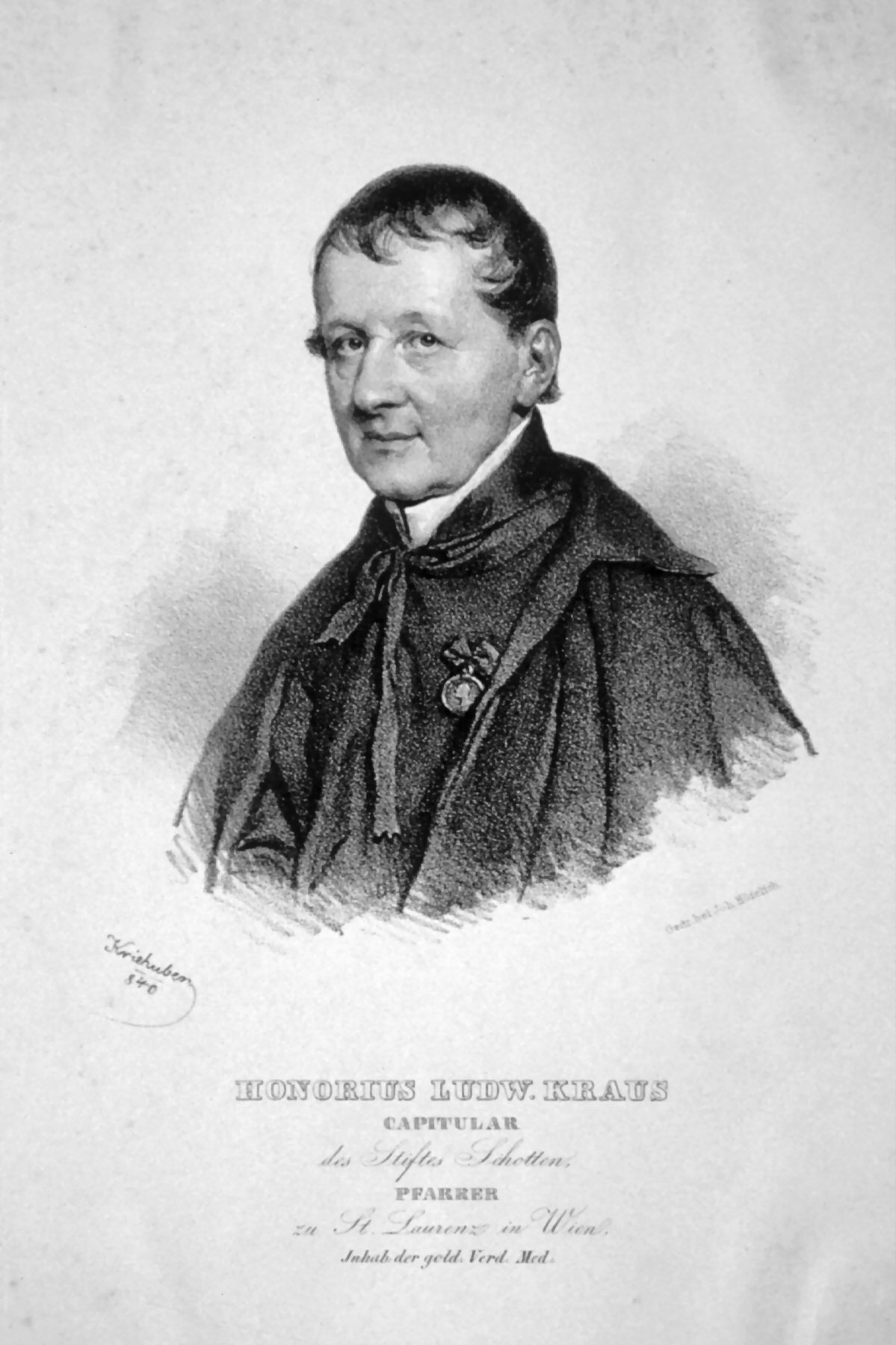 Honorius Ludwig Kraus (1773-1850), Kapitular des Schottenstiftes, Pfarrer zu St. Laurenz in Wien, Inhaber der goldenen Verdienst-Medaille.